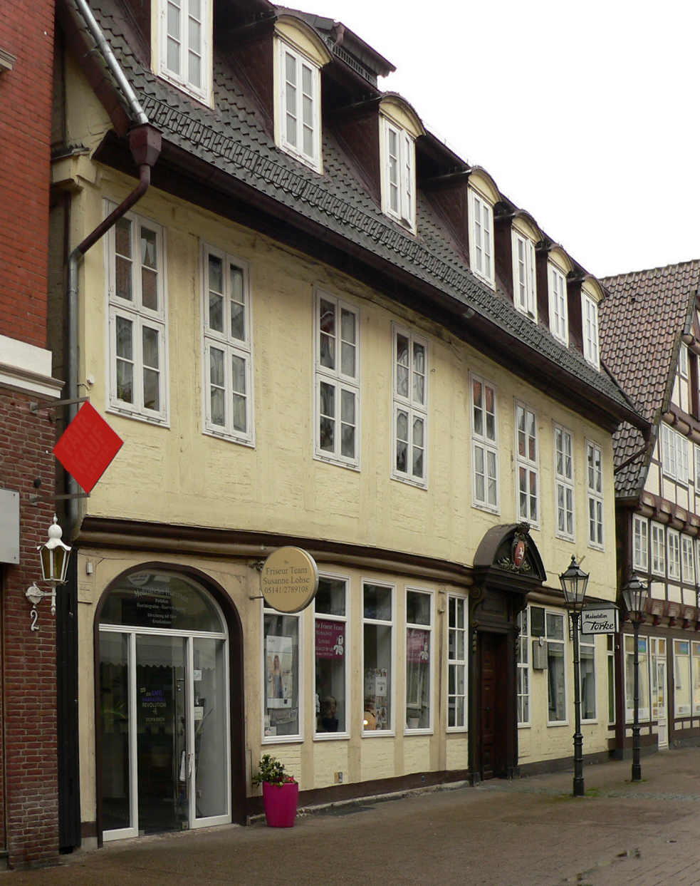 Celle Runde Strasse Wohnhaus Thaer